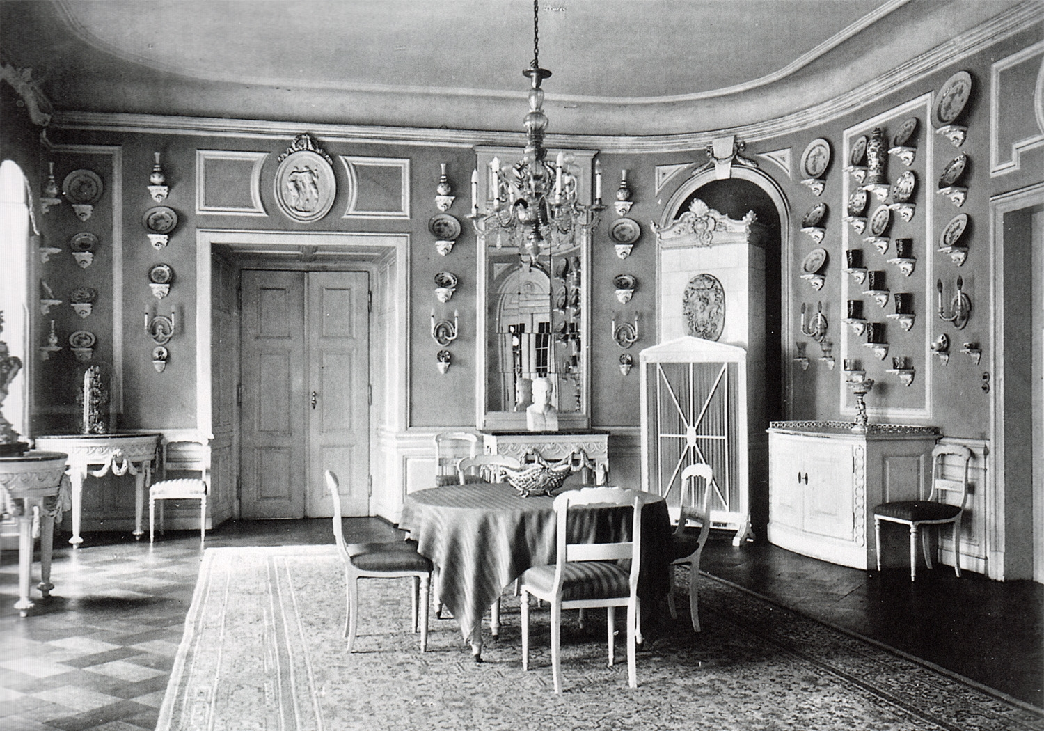 Speisezimmer („Verbündetenzimmer“) im Schloss Rötha, vor 1938